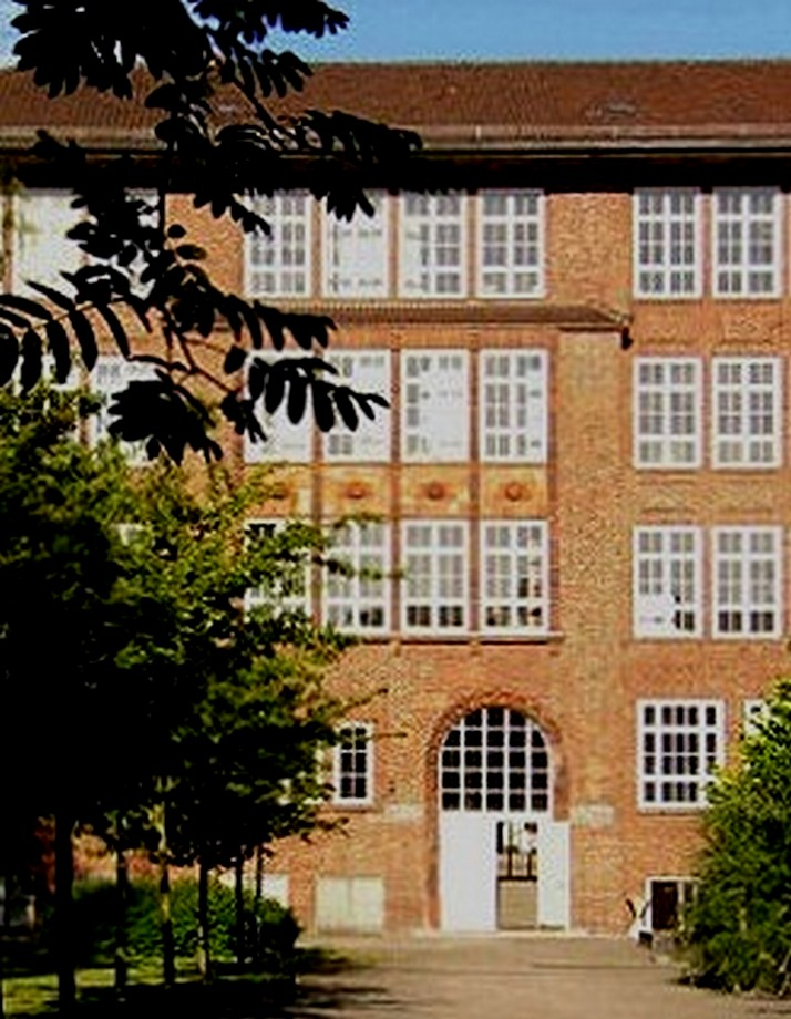 Schule in der Burgstraße in Hamburg-Borgfelde; Architekt: Fritz SchumacherThis is a photograph of an architectural monument.